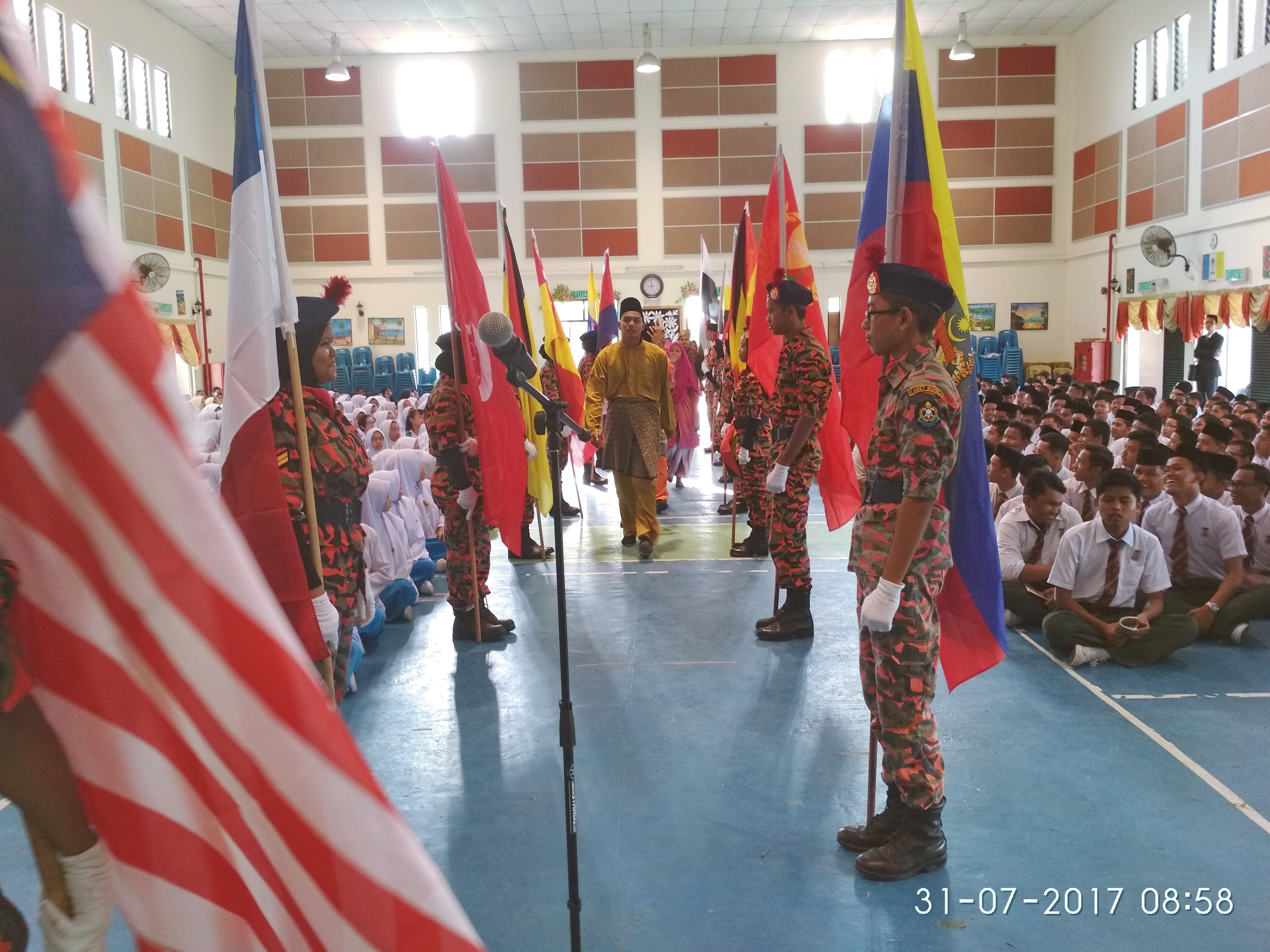 sketsa ucapan pengisytiharaan kemerdekaan